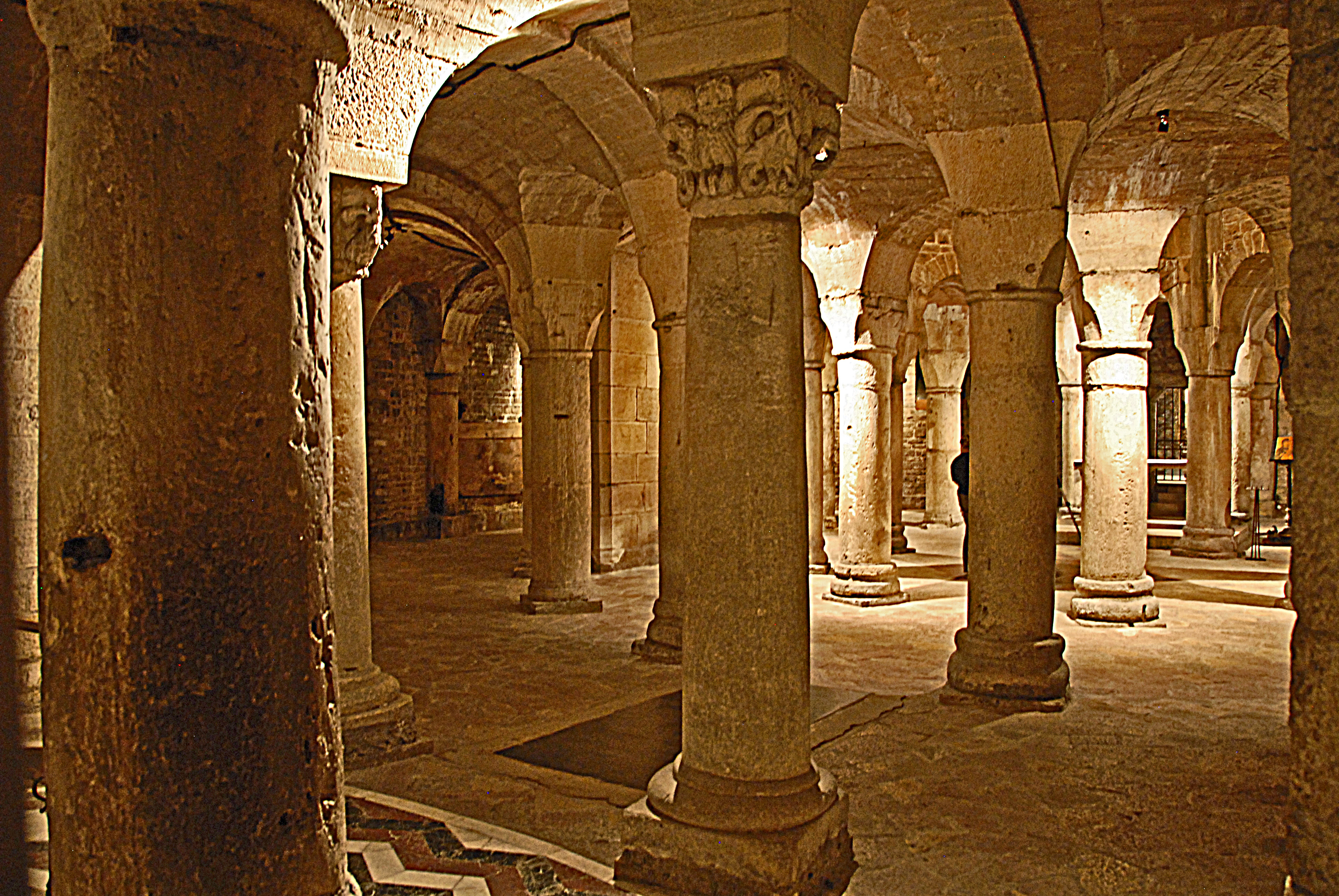 St-Bénigne, Krypta, vom Grab zur Rotunde